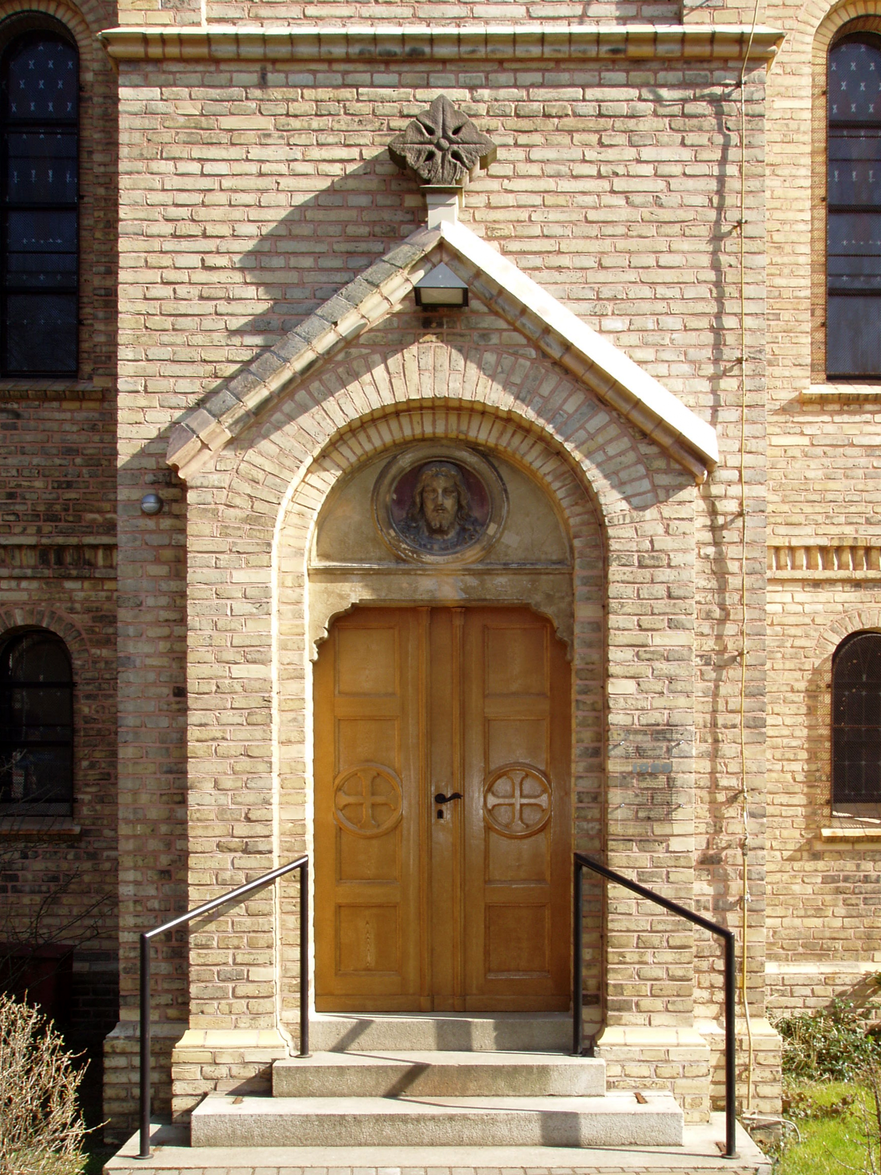 Evangelische Dorfkirche Glienicke/Nordbahn: Eingang zur Kirche mit Metallion, Rundbogen, Blendgiebel und Kreuzblume (Aufnahme 2014)